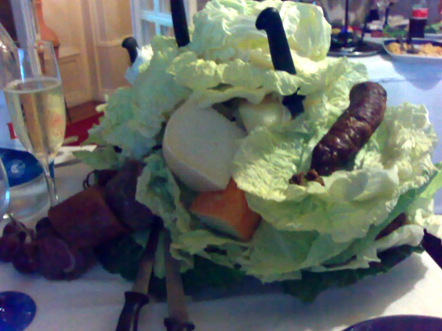 Um refeição típica em Cantanhede, em Portugal, com queijos e enchidos. A typical meal in Cantanhede, in Portugal, with cheese and chouriços.